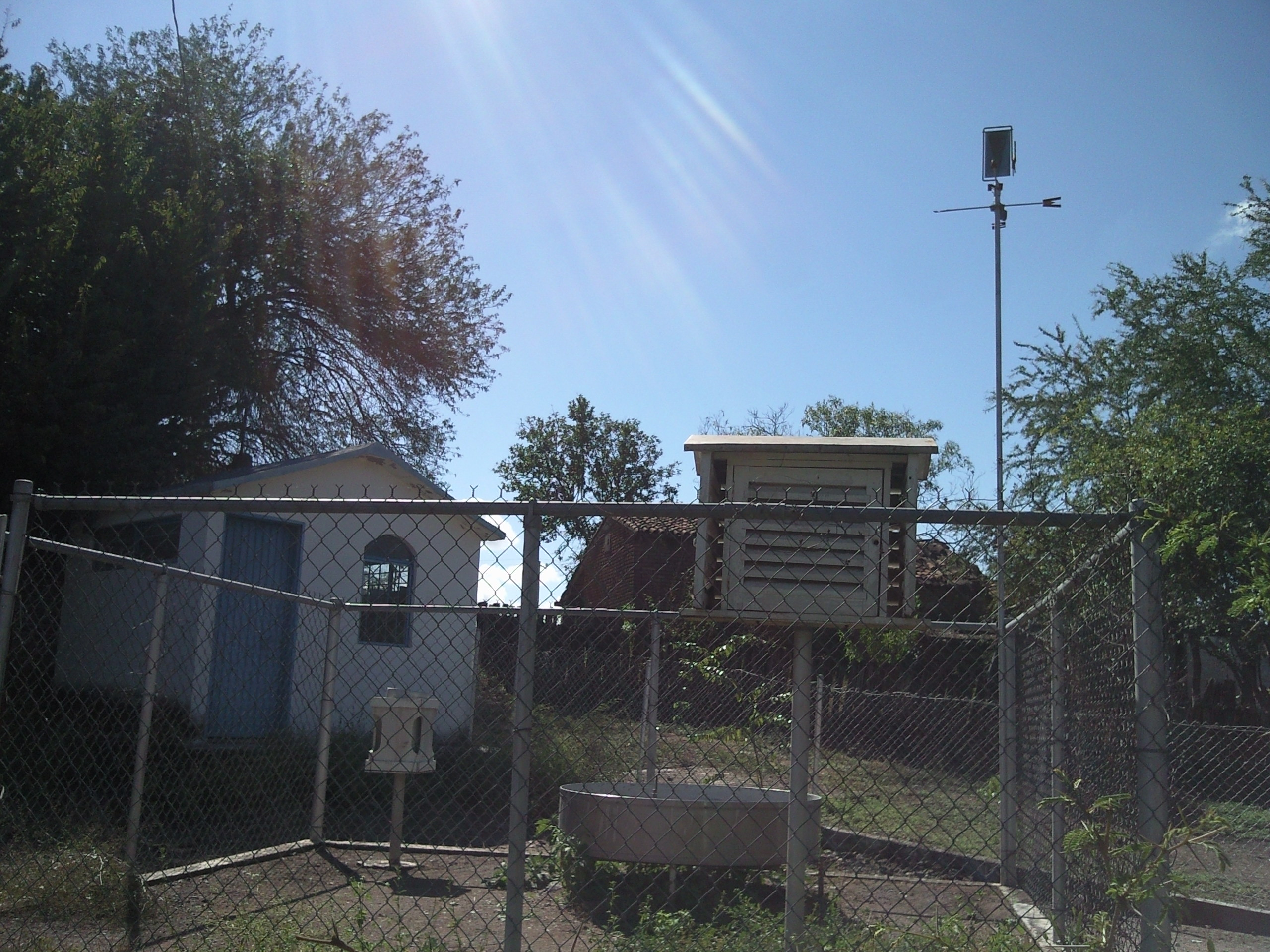 Estacion meteorologica 25001 Acatitan San Ignacio Sinaloa